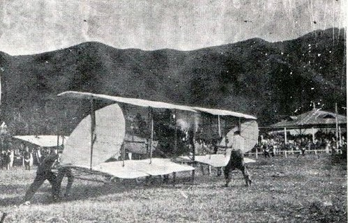 "El primer meeting de aviación en Caracas" Biplano de Frank E. Boland Caracas, 29 de Septiembre de 1912 El Cojo Ilustrado No. 499 pagina 525